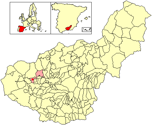 Situación de la localidad de Trasmulas (en el municipio de Pinos Puente) respecto a la provincia de Granada, en España.